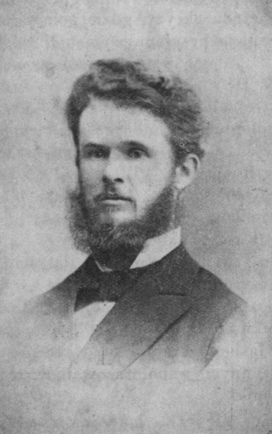 Portret Karola Drymmera w młodości